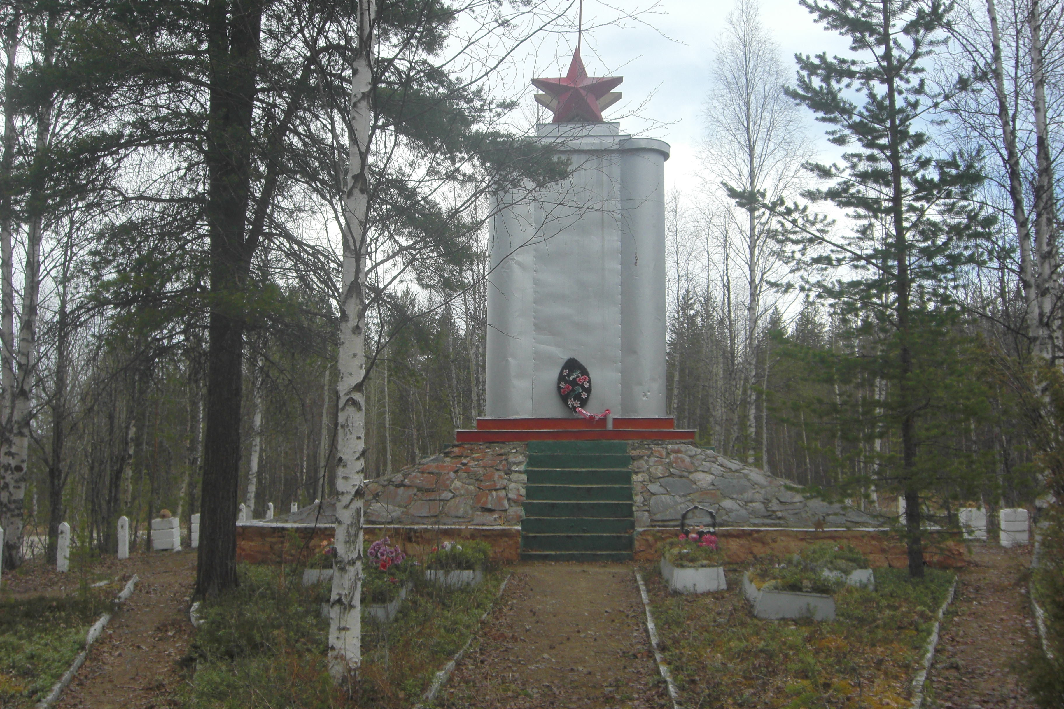 Верманский рубеж. Места боёв во 2-й мировой войне на реке Верман в Мурманской области. Монумент павшим русским воинами. (захоронено около 1000 человек.) состояние 25 Мая 2009